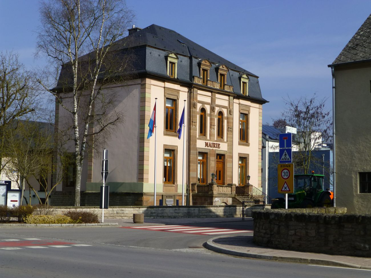 La Mairie de Bissen (Luxembourg)